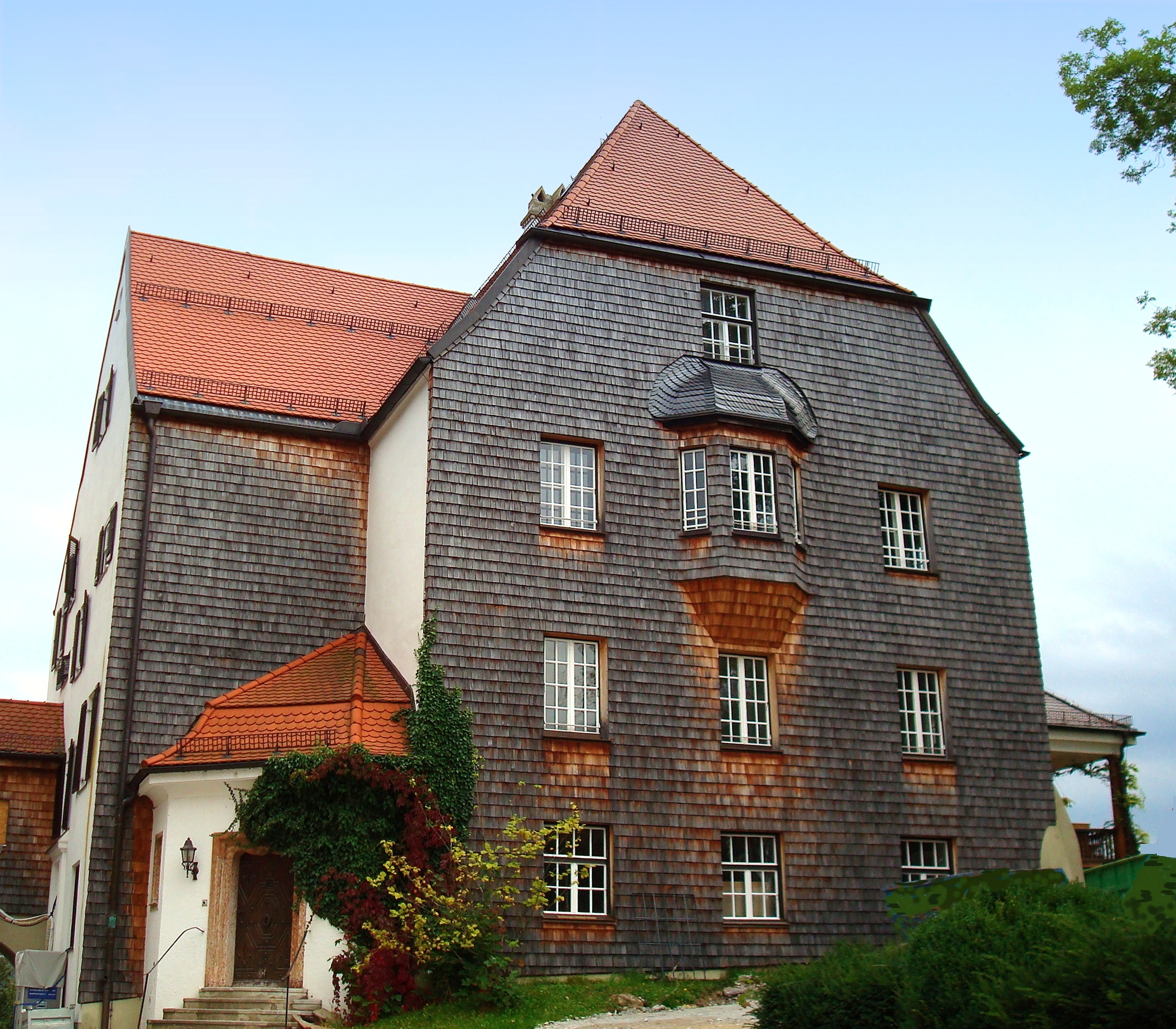 Berg am Starnberger See, OT Kempfenhausen, Schloss Kempfenhausen. This is a photograph of an architectural monument.